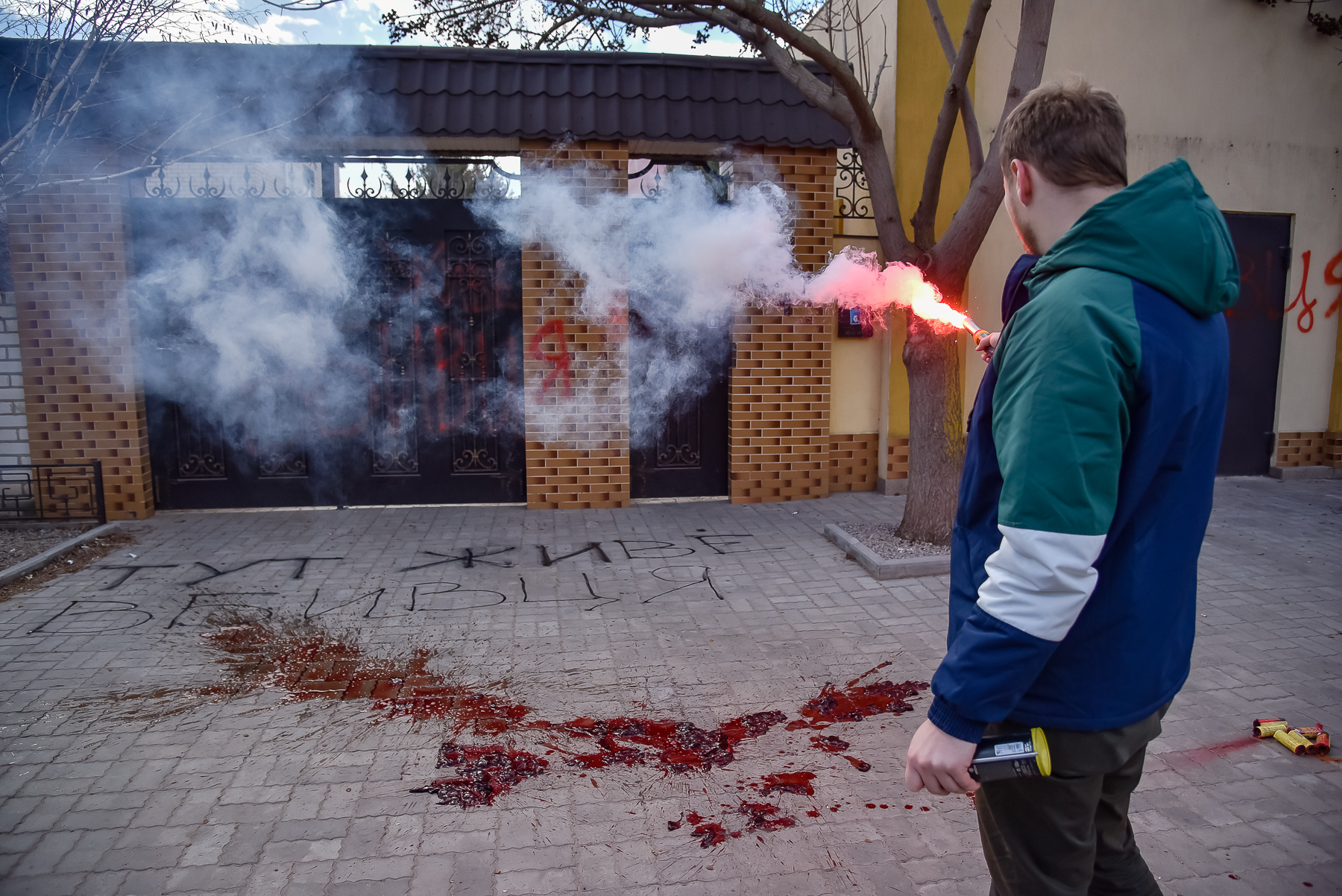 В Херсоні активісти та друзі Катерини Гандзюк провели кілька акцій, щоб нагадати - замовники вбивства Гандзюк досі на волі.